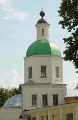 Церковь на территории Коломенского ВАКУ. Восстановлена в августе 1999г. Освящена Алексием II